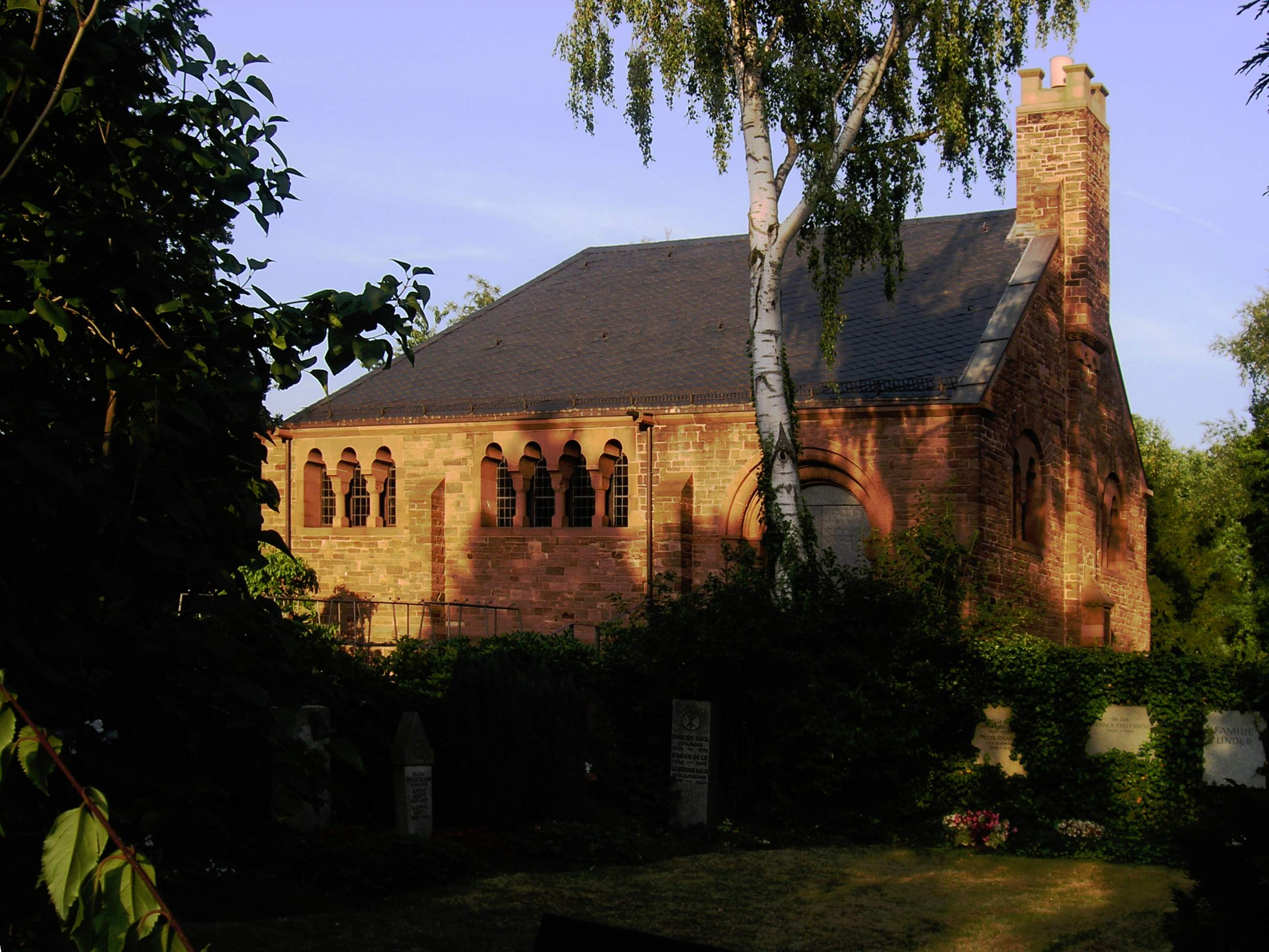 Kleine Kapelle auf dem Hauptfriedhof Karlsruhe, ehemaliges Krematorium, von August Stürzenacker